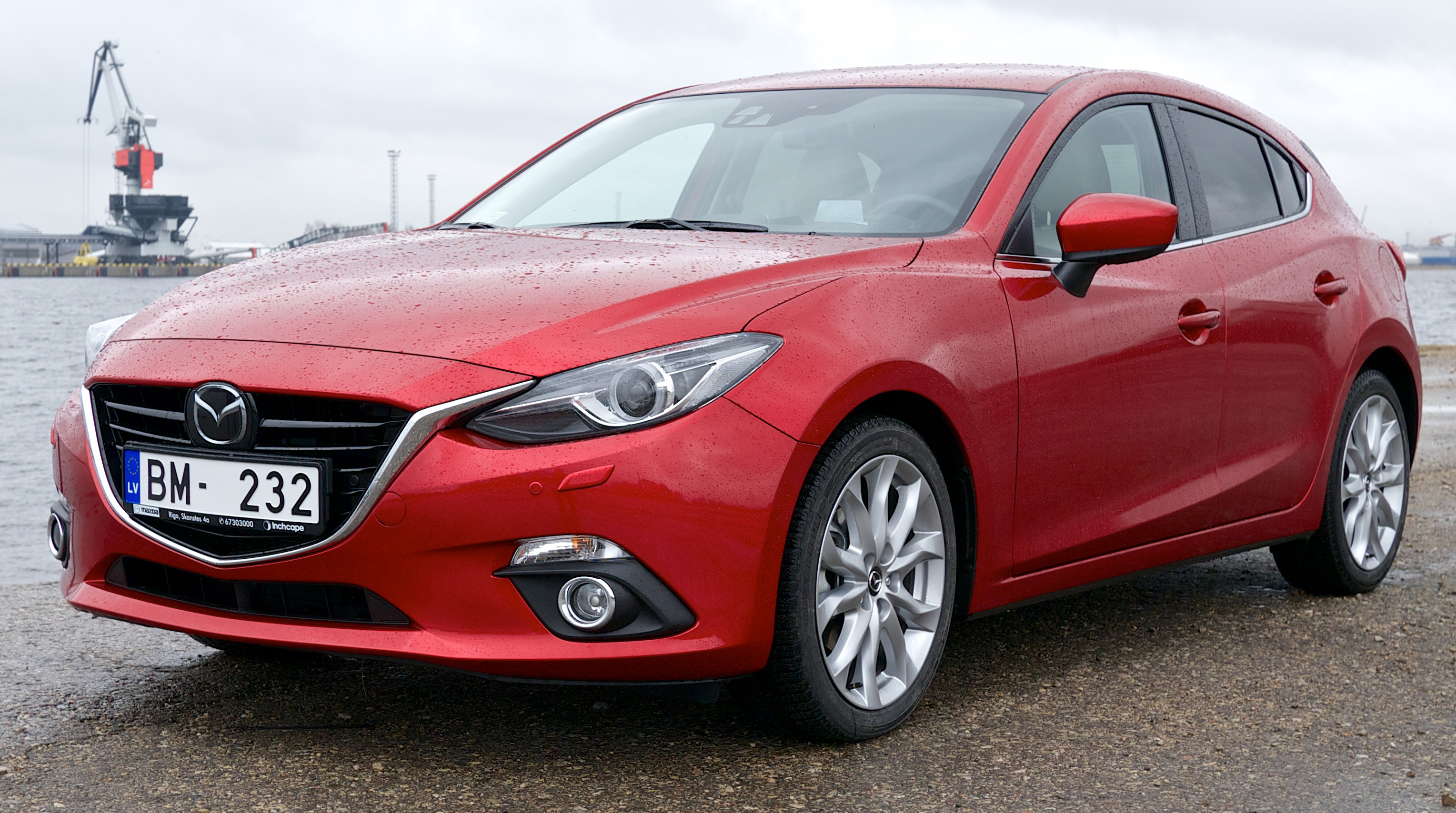 Mazda Mazda3 2014